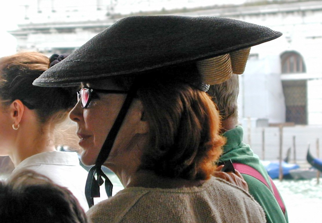 Marina Ripa di Meana. Foto scattata da me a Venezia il 29.8.03.